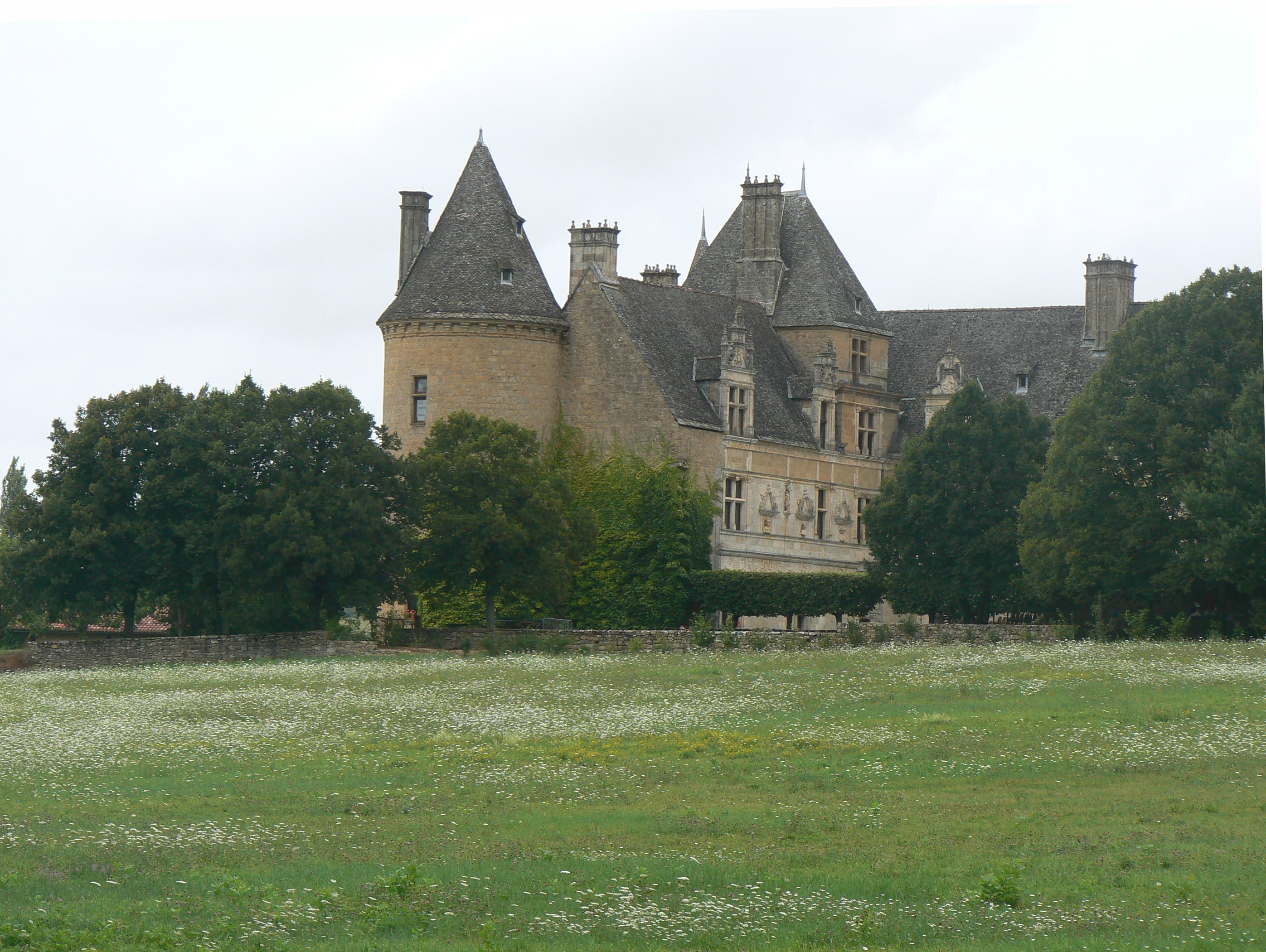 Vu du château depuis le domaine.